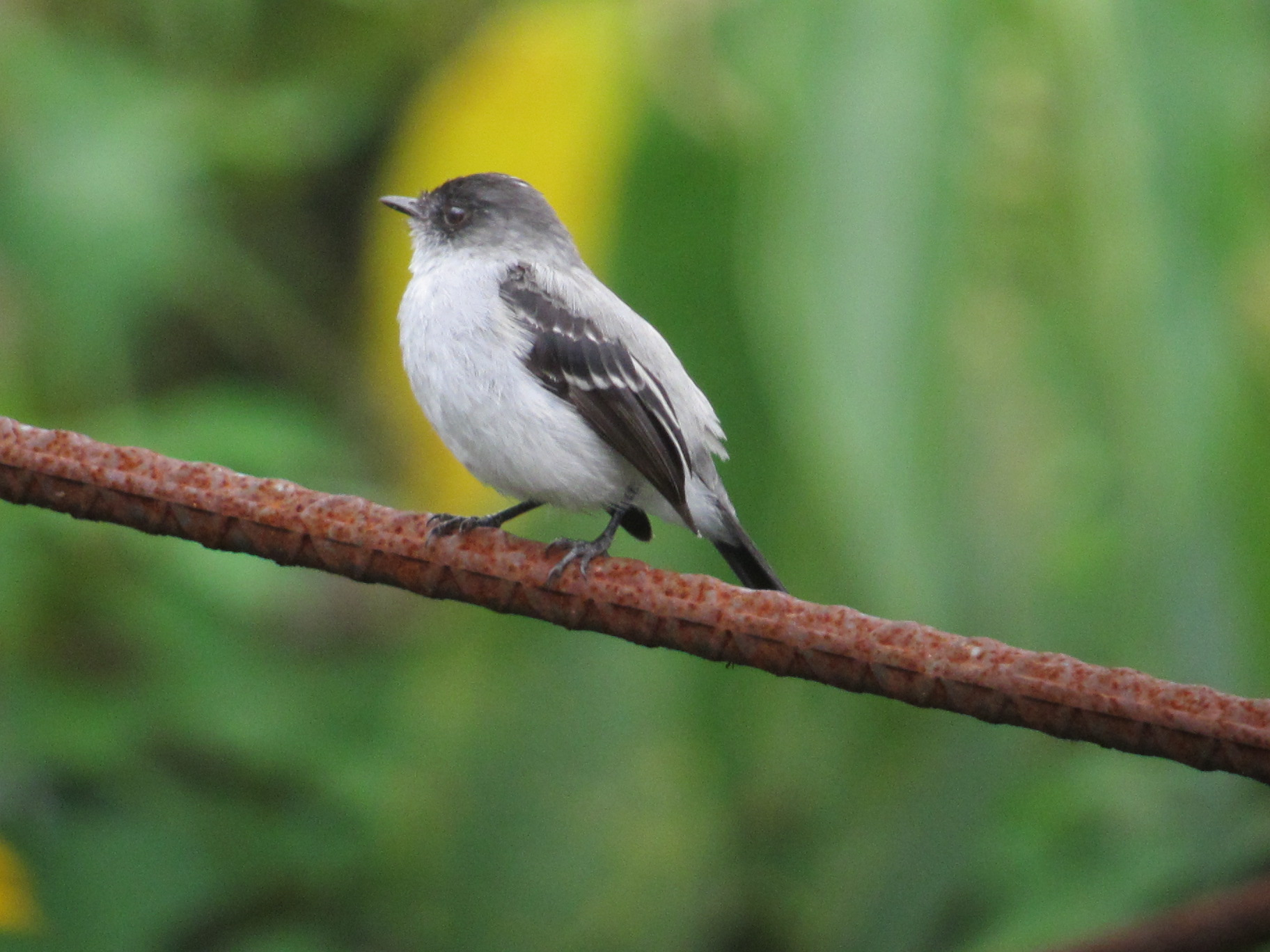 Guatapé, Antioquia, Colombia